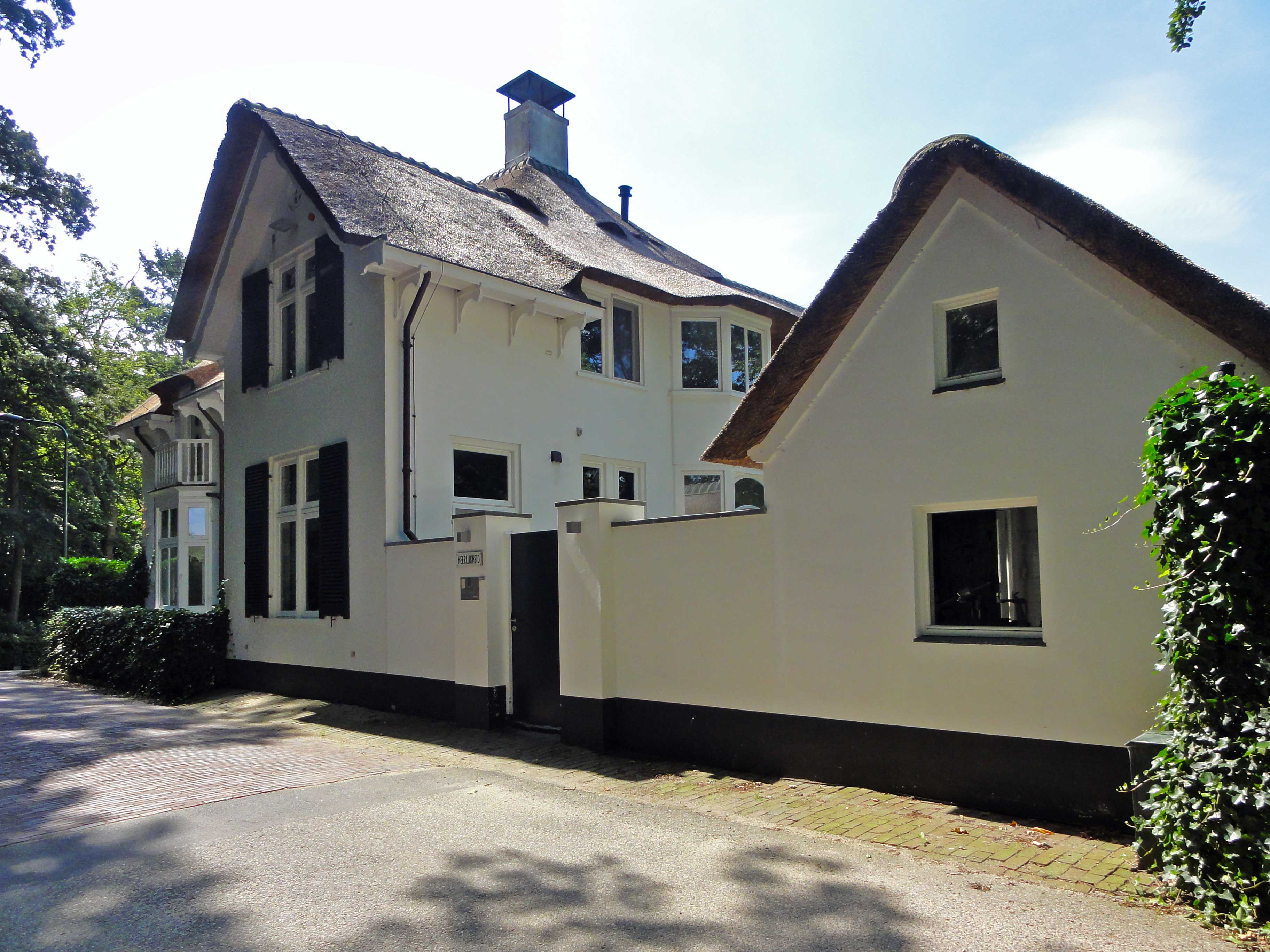 Landhuis Heerlijkheid in Huizen